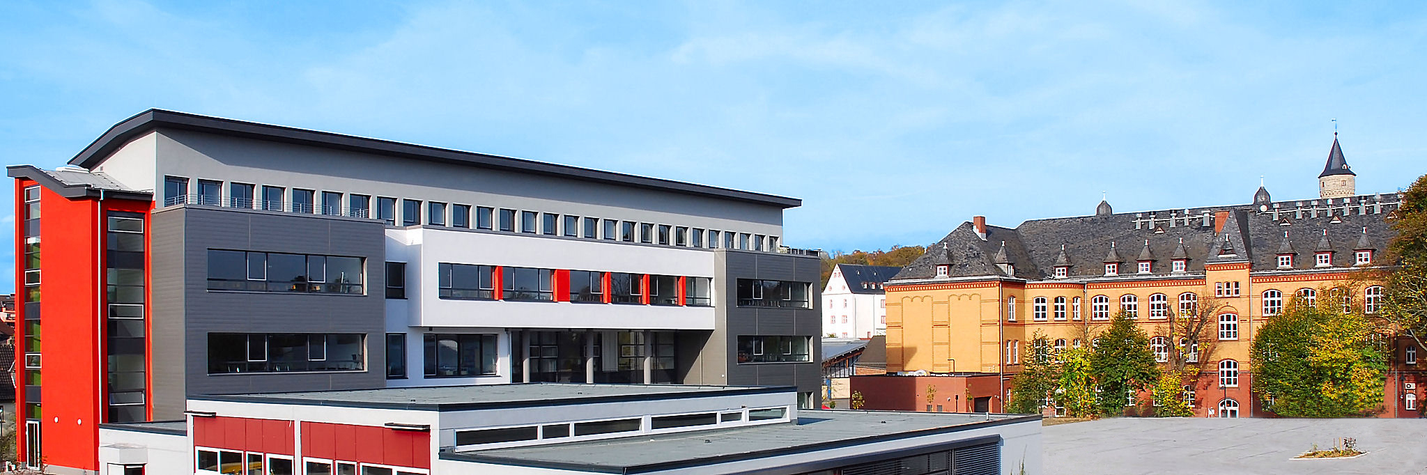 Hochschulcampus Idstein